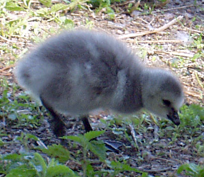 Weißwangengans-Gössel (Branta leucopsis)